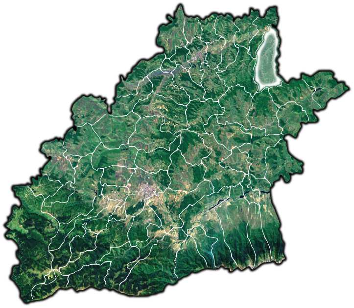 Laslea jud Sibiu